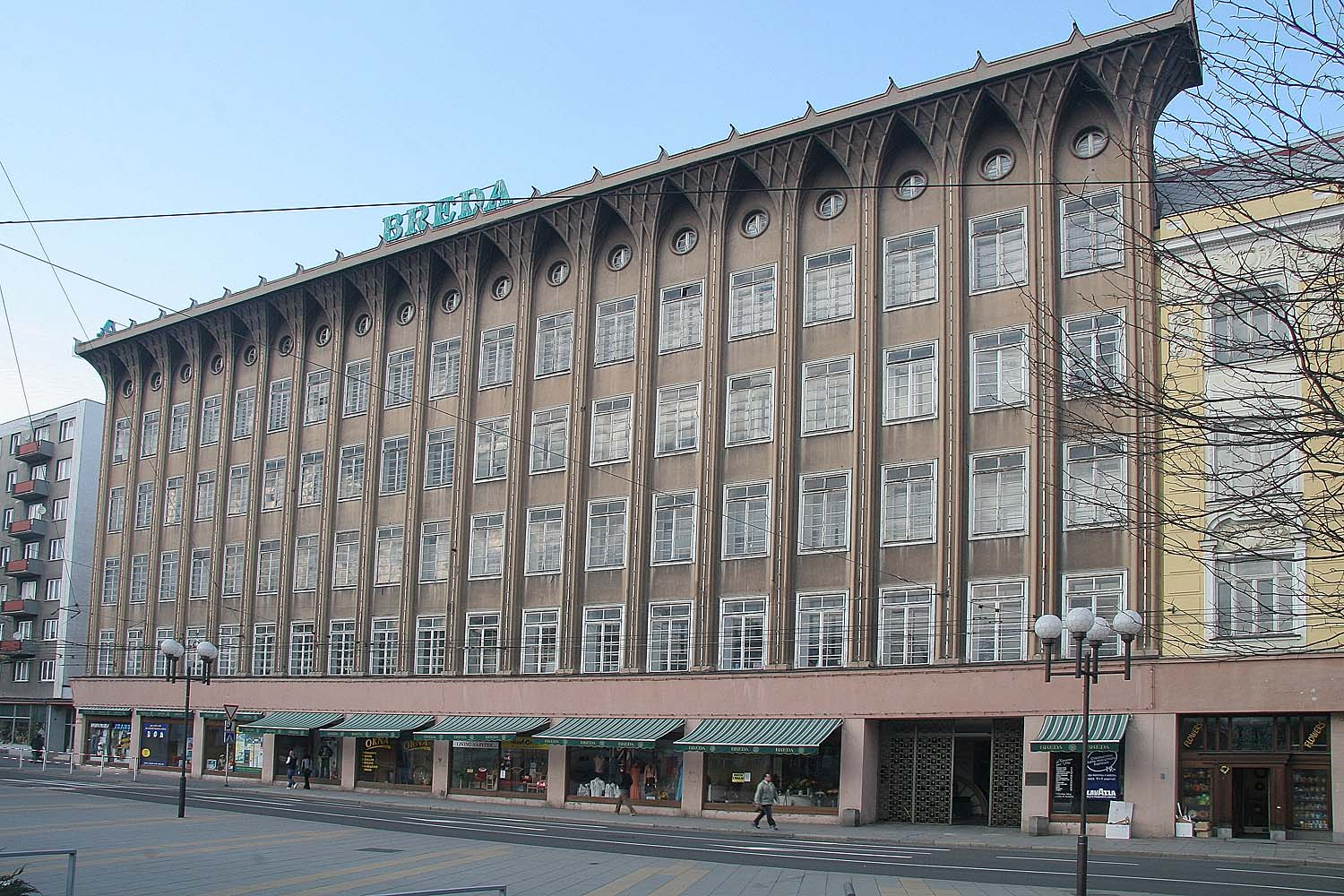 bývalý obchodní dům Breda v Opavě, district Opava, Czech Republic